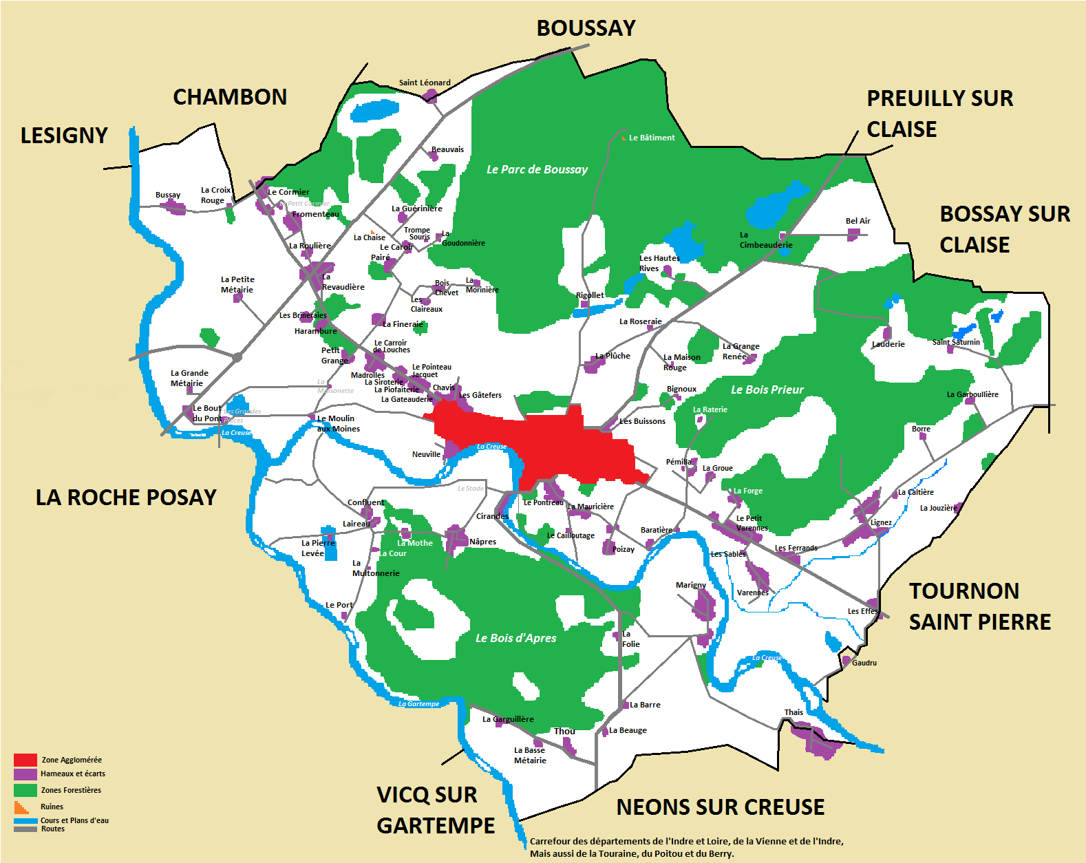 Cartes d'Yzeures-sur-Creuse